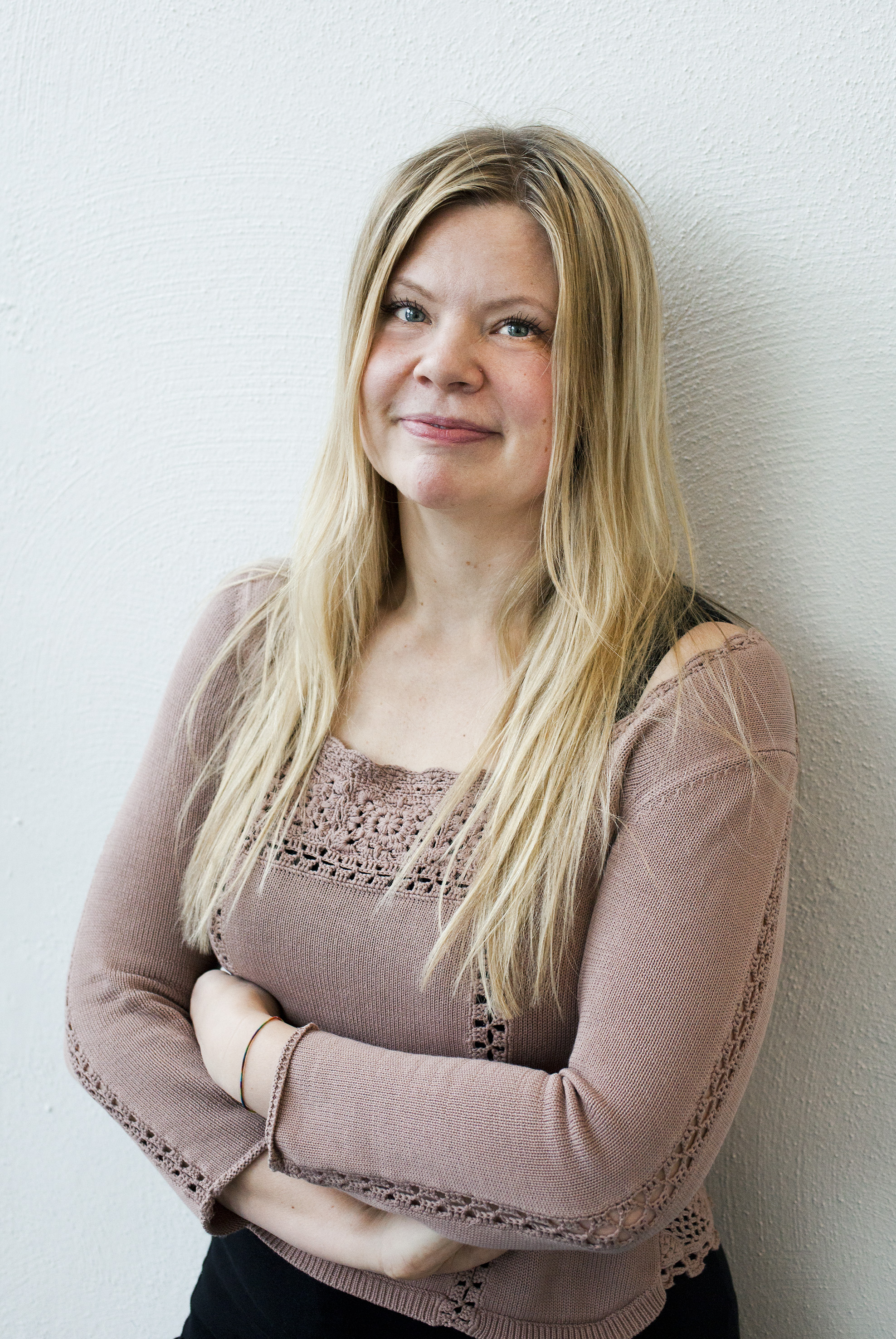 Stiina Saaristo In Kiasma Petri Virtanen, valokuvaaja / photographer